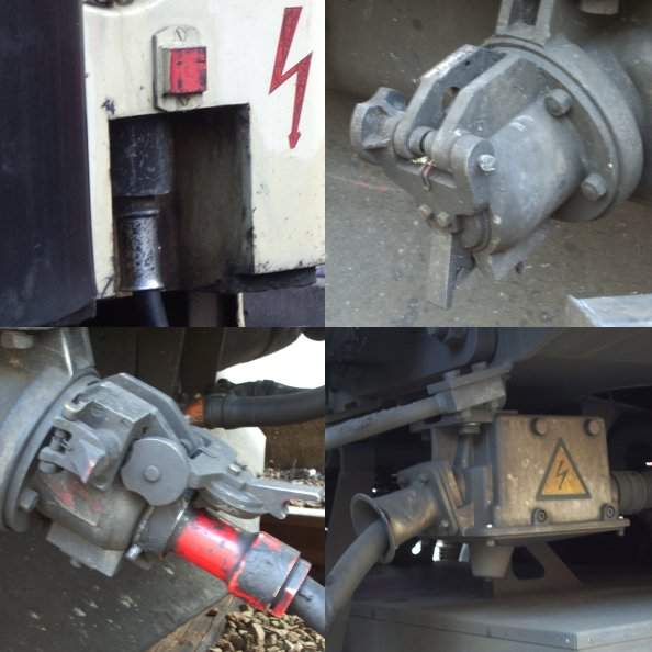 Das Bild zeigt vier Fotos von Zugsammelschienen, aufgenommen am 28.06.2005 im Österreichischen Kleinreifling. Von links oben nach rechts unten: Unbenutzter Stecker eines Reisezugwagens Unbenutzte Buchse der 1142 634 Stecker an 1142 634 Stecker am Reisezugwagen